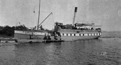 DS Gjøvik ved Kisebrygga, Nes, Hedmark